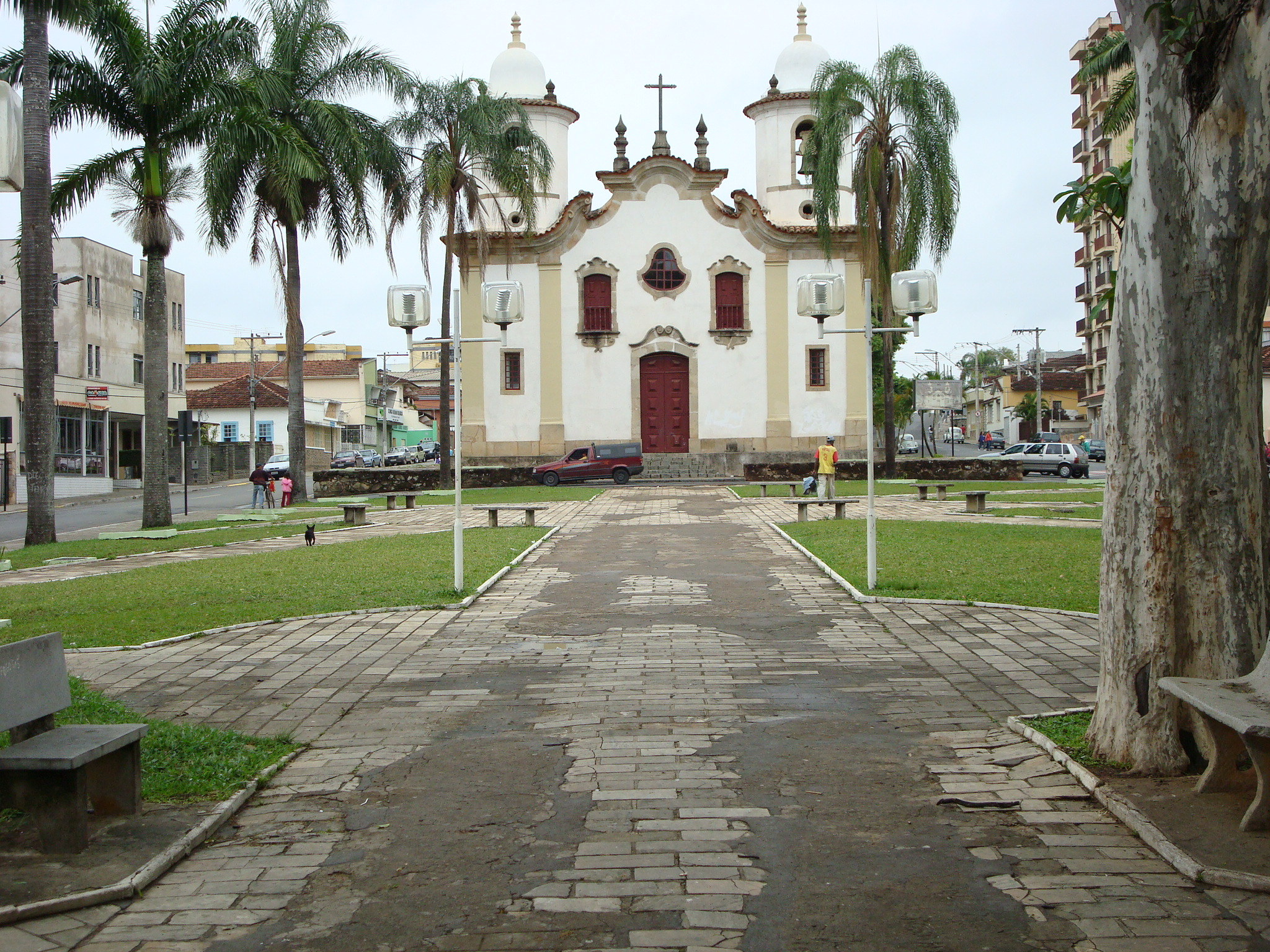 velha matriz